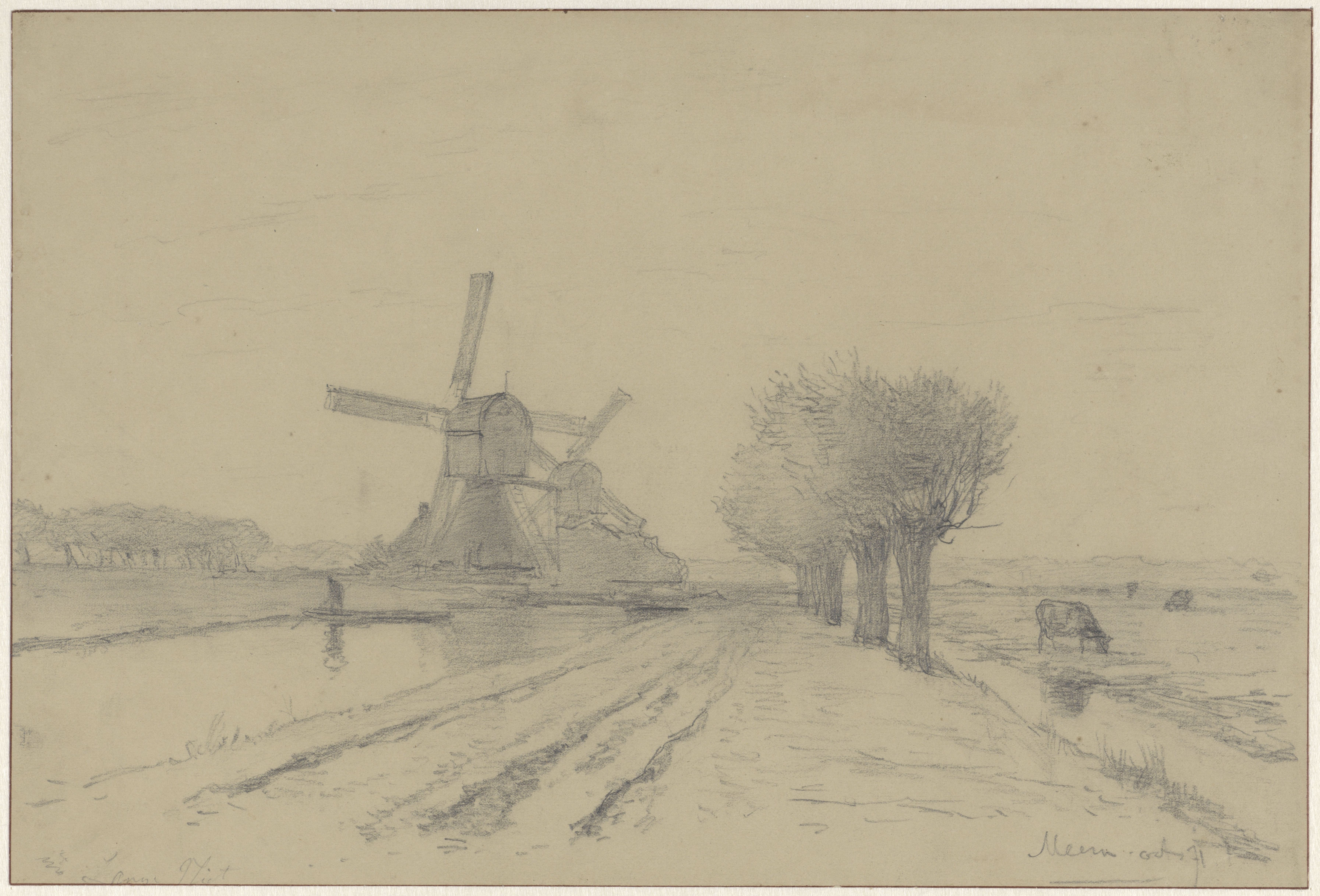 De Rode Molen en Sluismolen aan de vliet langs de Meentweg in De Meern, getekend door Willem Roelofs in 1871